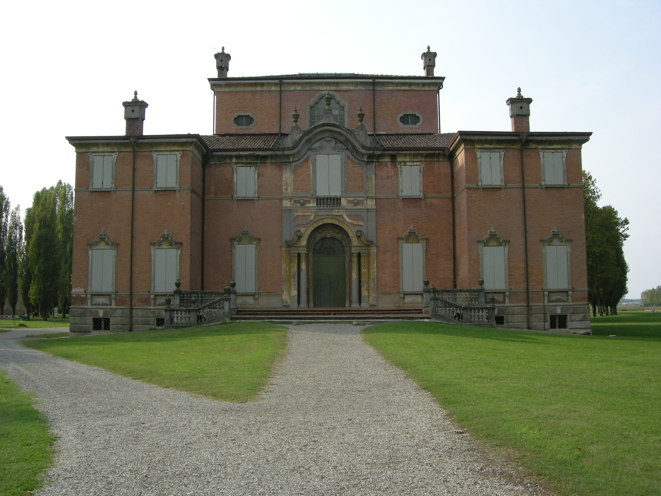 Villa sorra